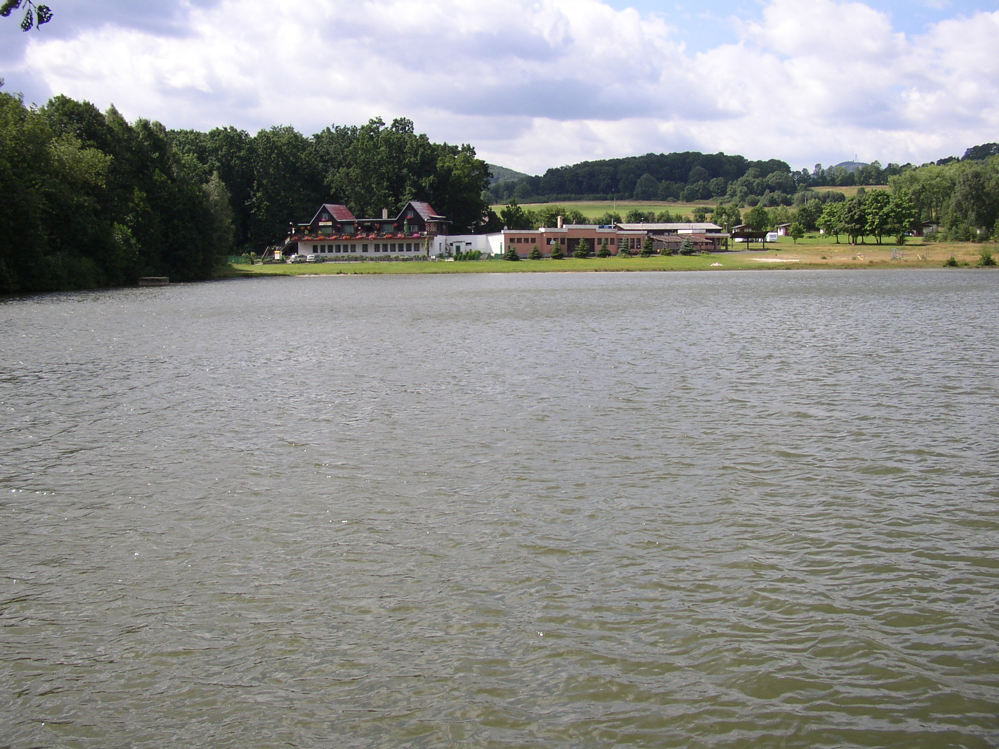 Varnsdorfský rybník s restaurací Koliba